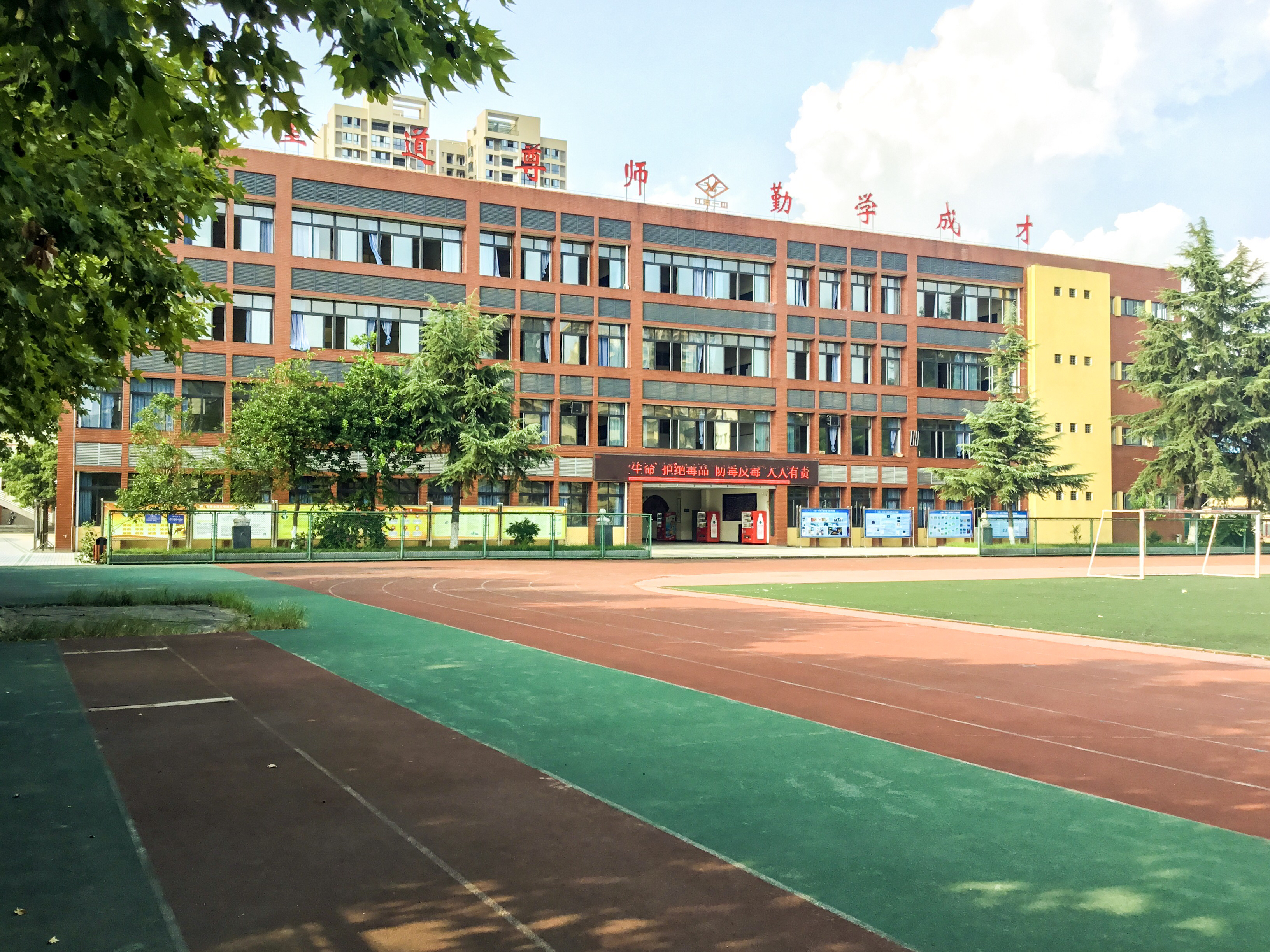 在2017/8/4由iPad（2017）拍摄，使用了HDR模式且运用了Adobe Lightroom的iPad版应用程序调整色彩。